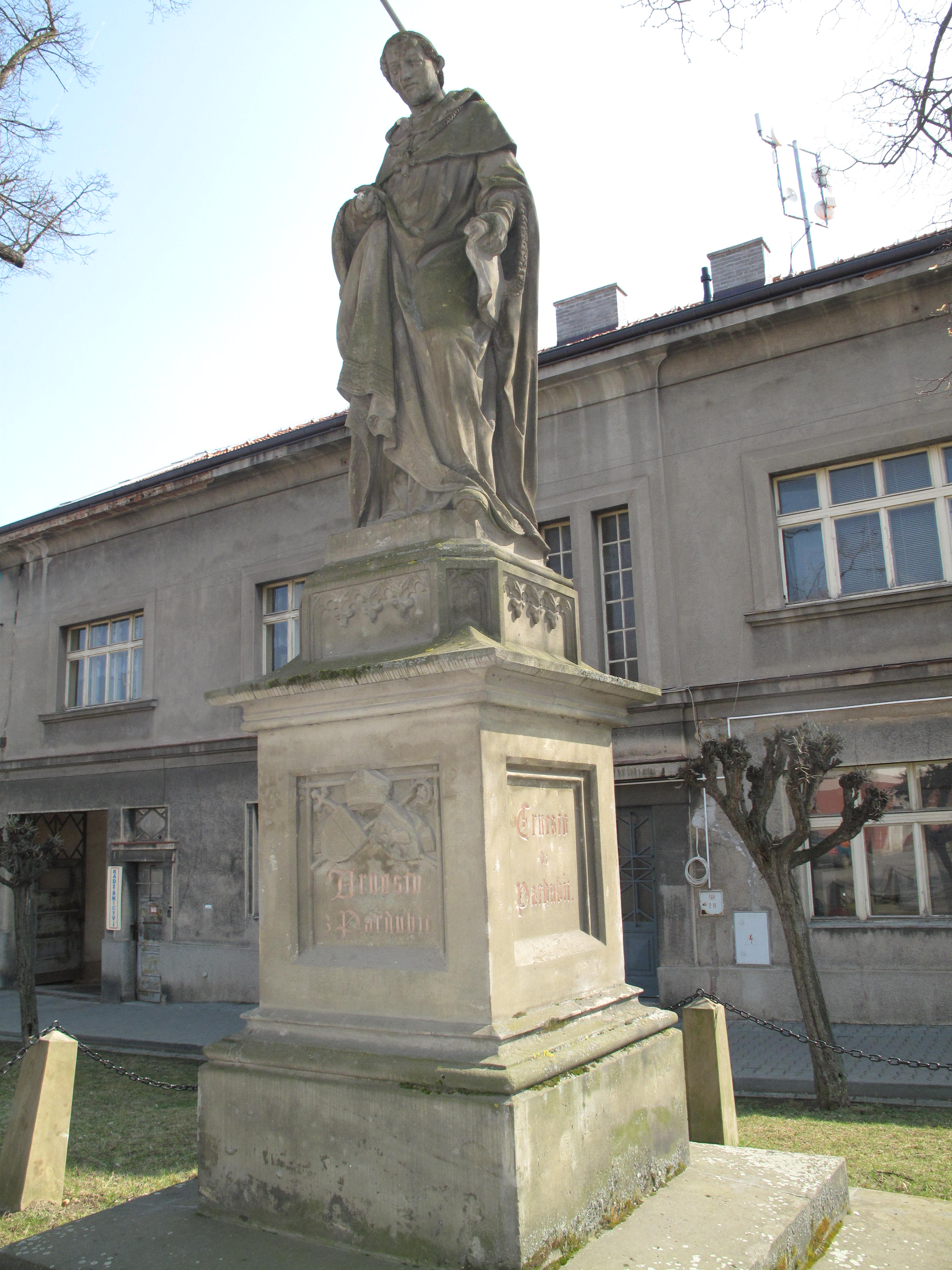 Úvaly, socha Arnošta z Pardubic.